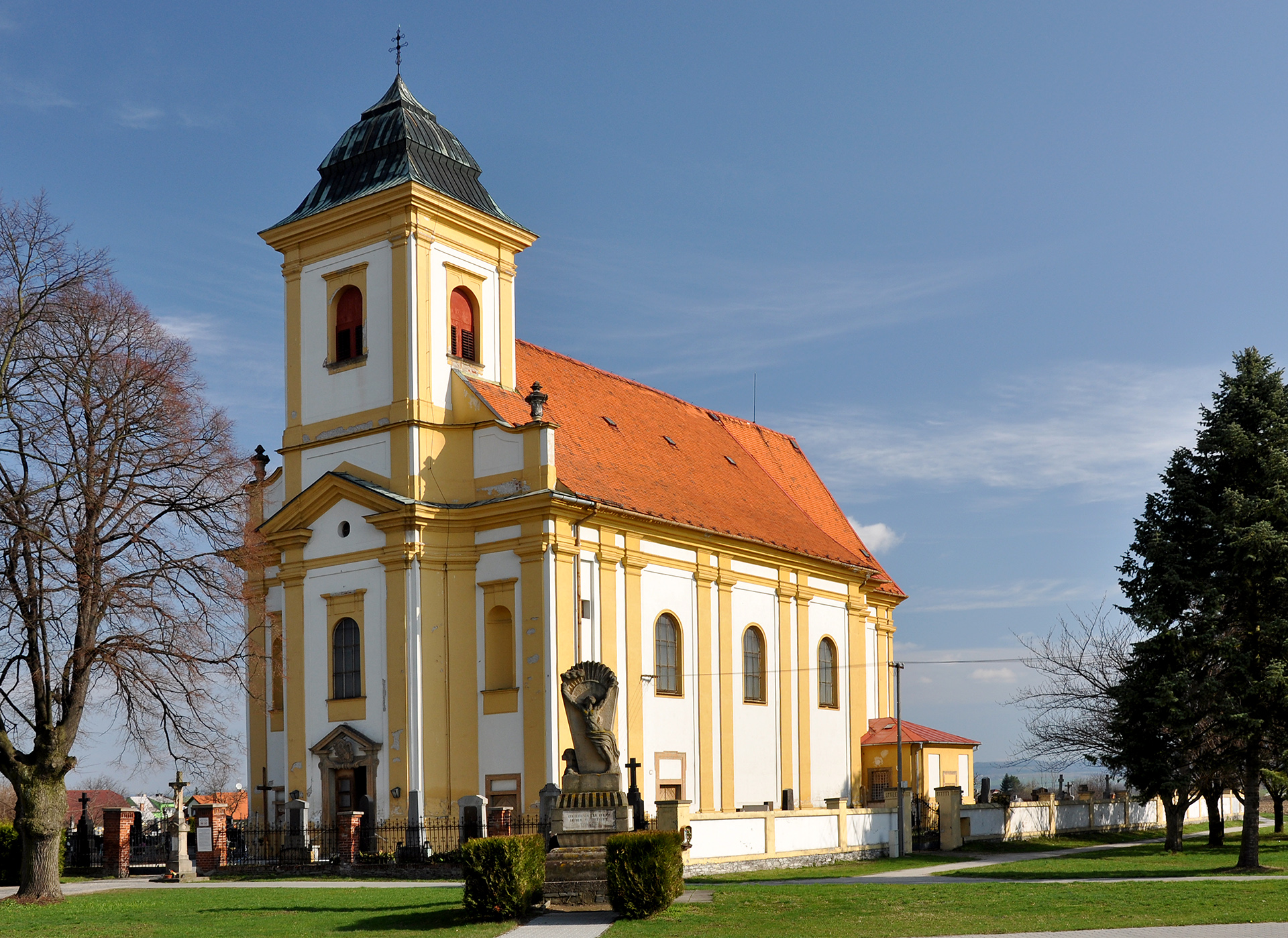 Kostel svatého Vavřince, Dolní, hřbitov, střed obce, Štěpánov (okres Olomouc).